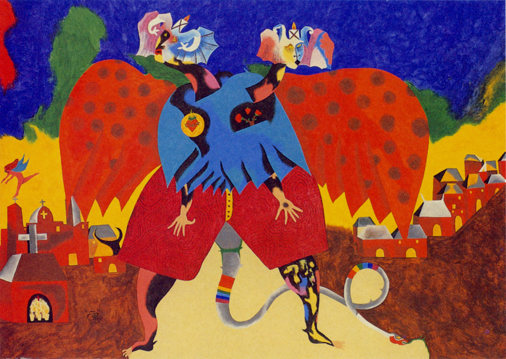 1981 год, частное собрание, Москва